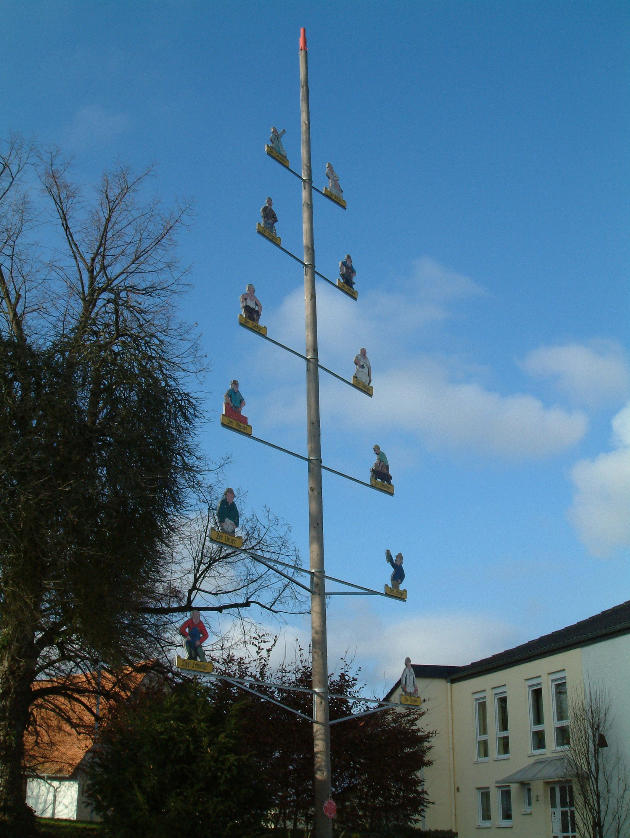 Zunftbaum zu Obersülzen, selbst fotografiert am 2006-12-18 und freigegeben durch Benutzer:Mundartpoet